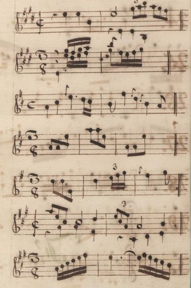 Table du volume III des manuscrits de Venise (incipit des sonates 1 à 7, K. 206 à 212)